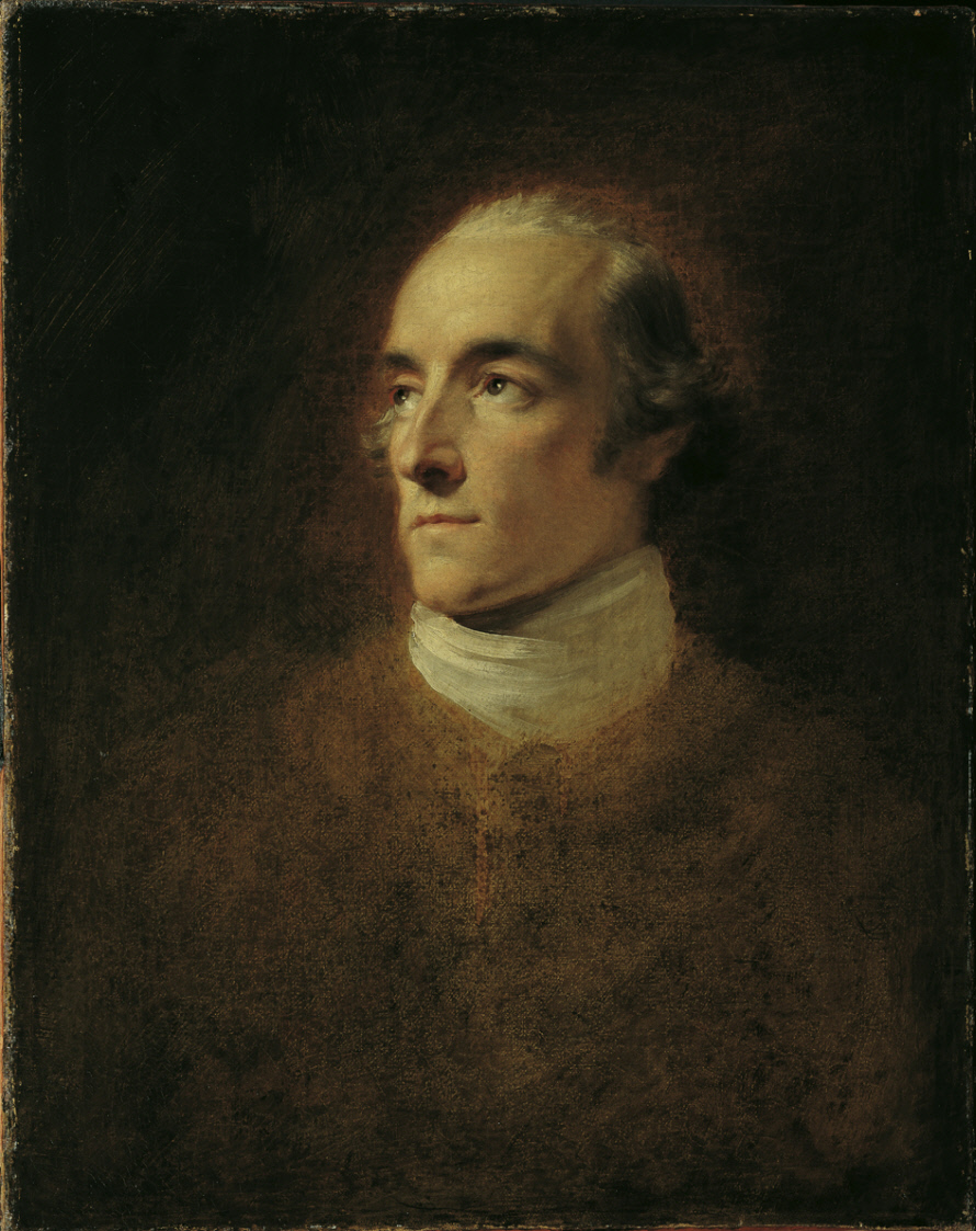 Franz Josef Graf Saurau (1760-1832), Leiter der Wiener Hofkanzlei und Berater Kaiser Franz' II.